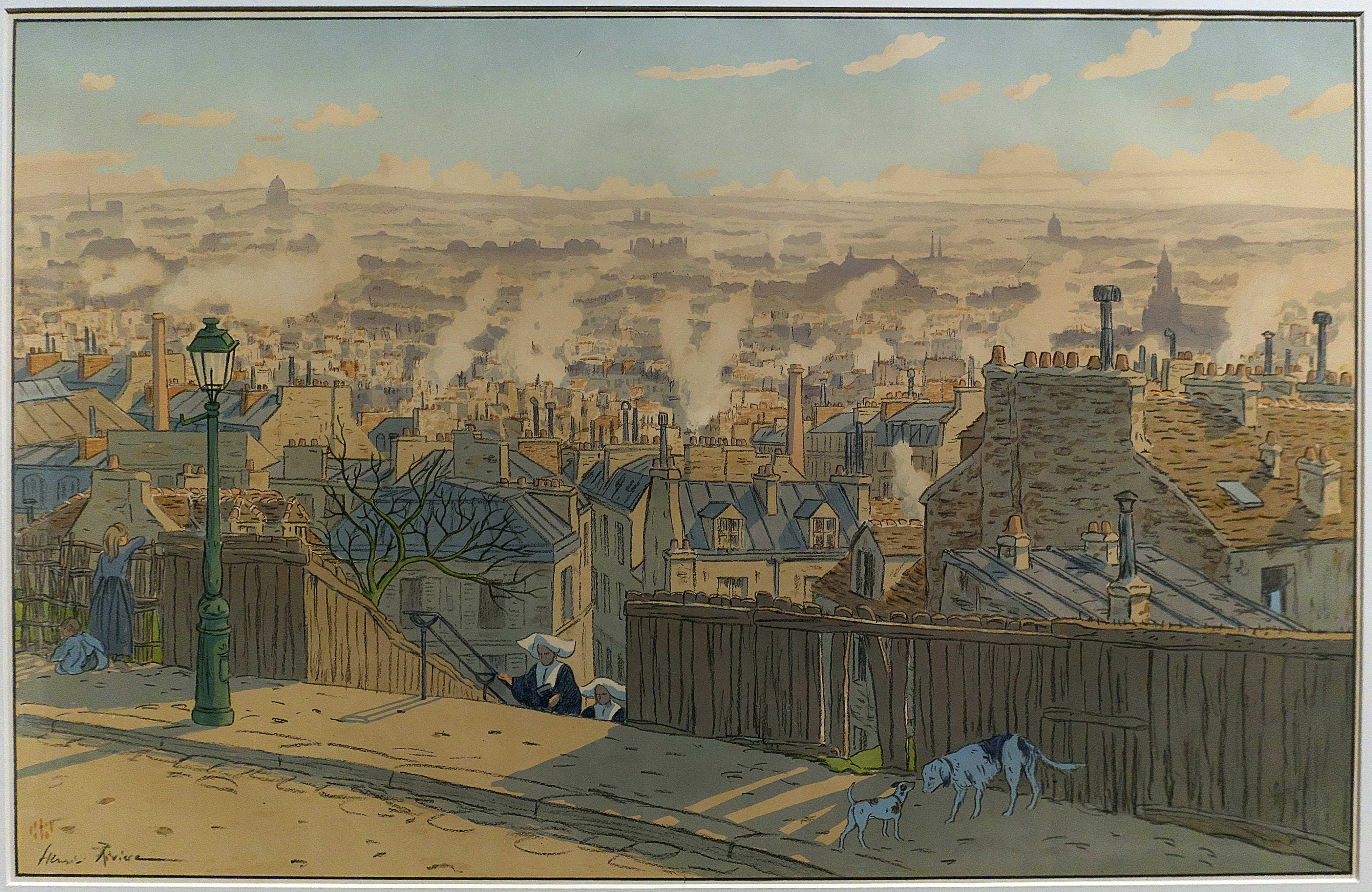 Litografía de Henri Rivière (1900)